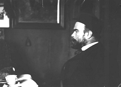 aul Verlaine, door Willem Witsen. (Collectie Prentenkabinet/Studie en Documentatie Centrum voor Fotografie (SDCF), Universiteit Leiden, inv.nr. E.230 )